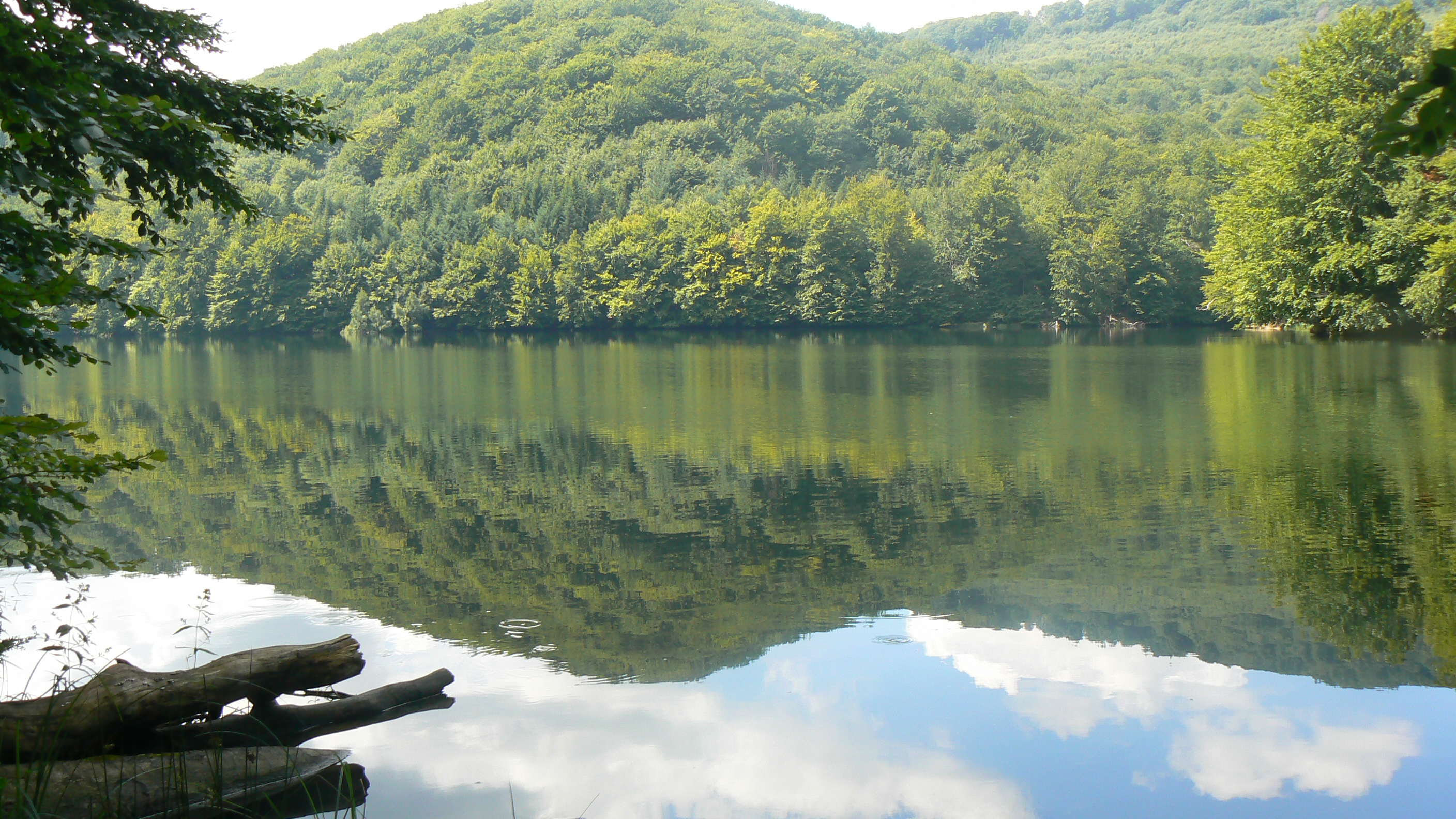 Jazero Morské oko.